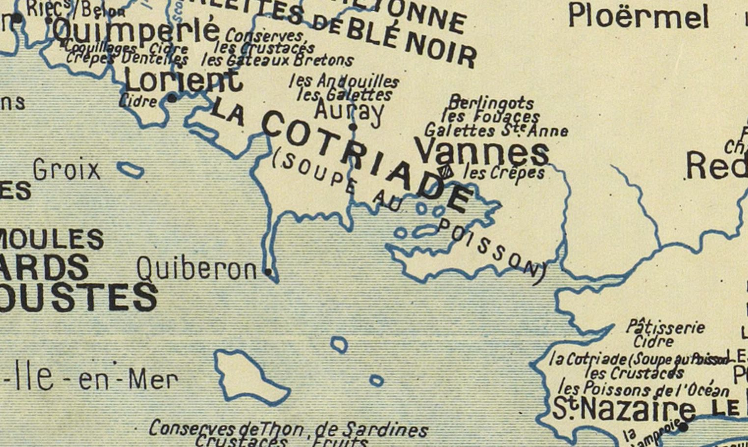 Localisation de la consommation de cotriade en Bretagne sud, selon la Carte gastronomique de la France, de Bourguignon Alain